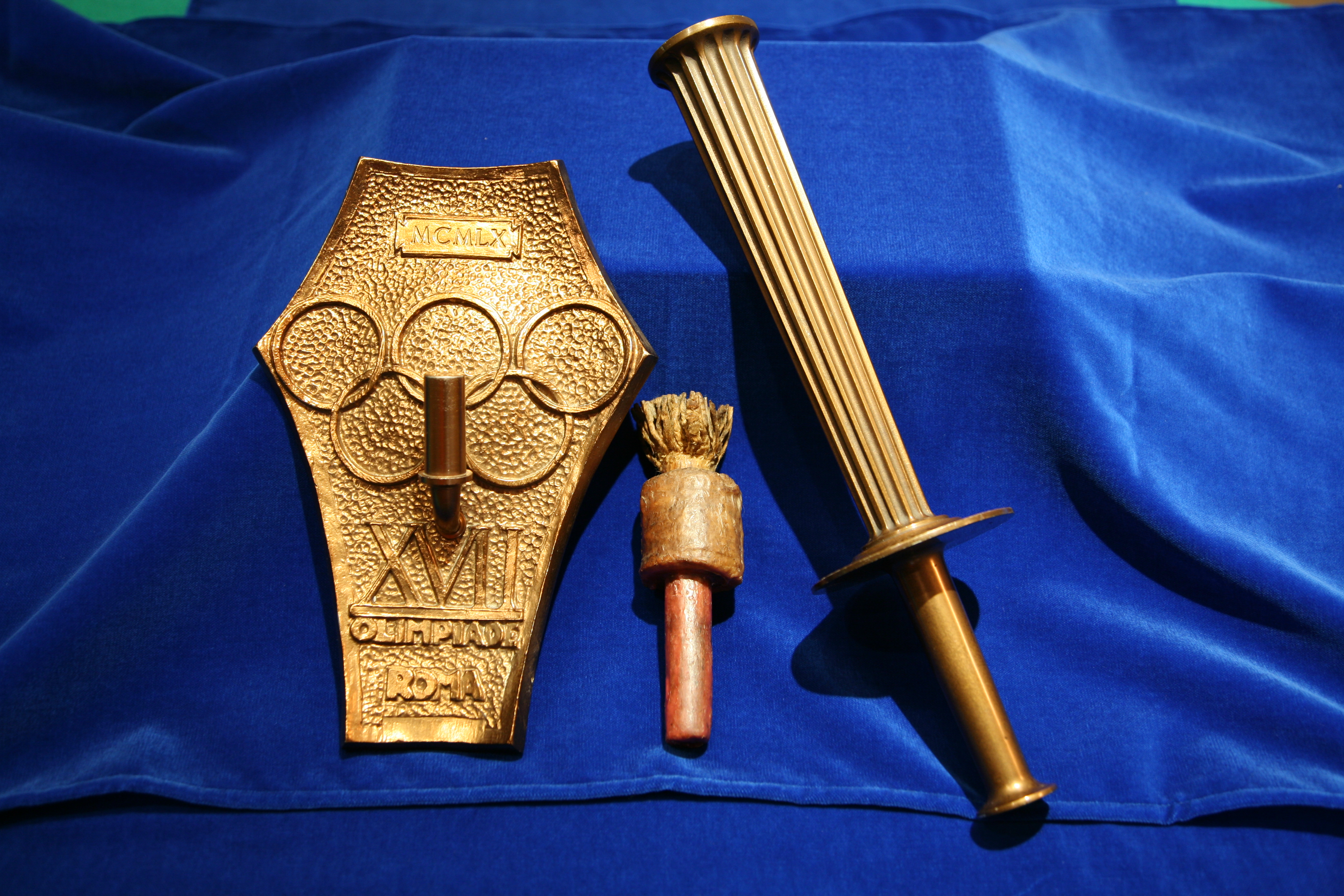 Torcia Olimpica Roma 1960, completa di supporto originale e stoppino combustibile in cera, collezione Fabio Ferrari